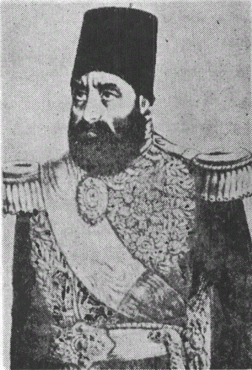 میرزا محمد خان سپهسالار، وزیر جنگ و قائم‌مقام شاه در زمان ناصرالدین شاه